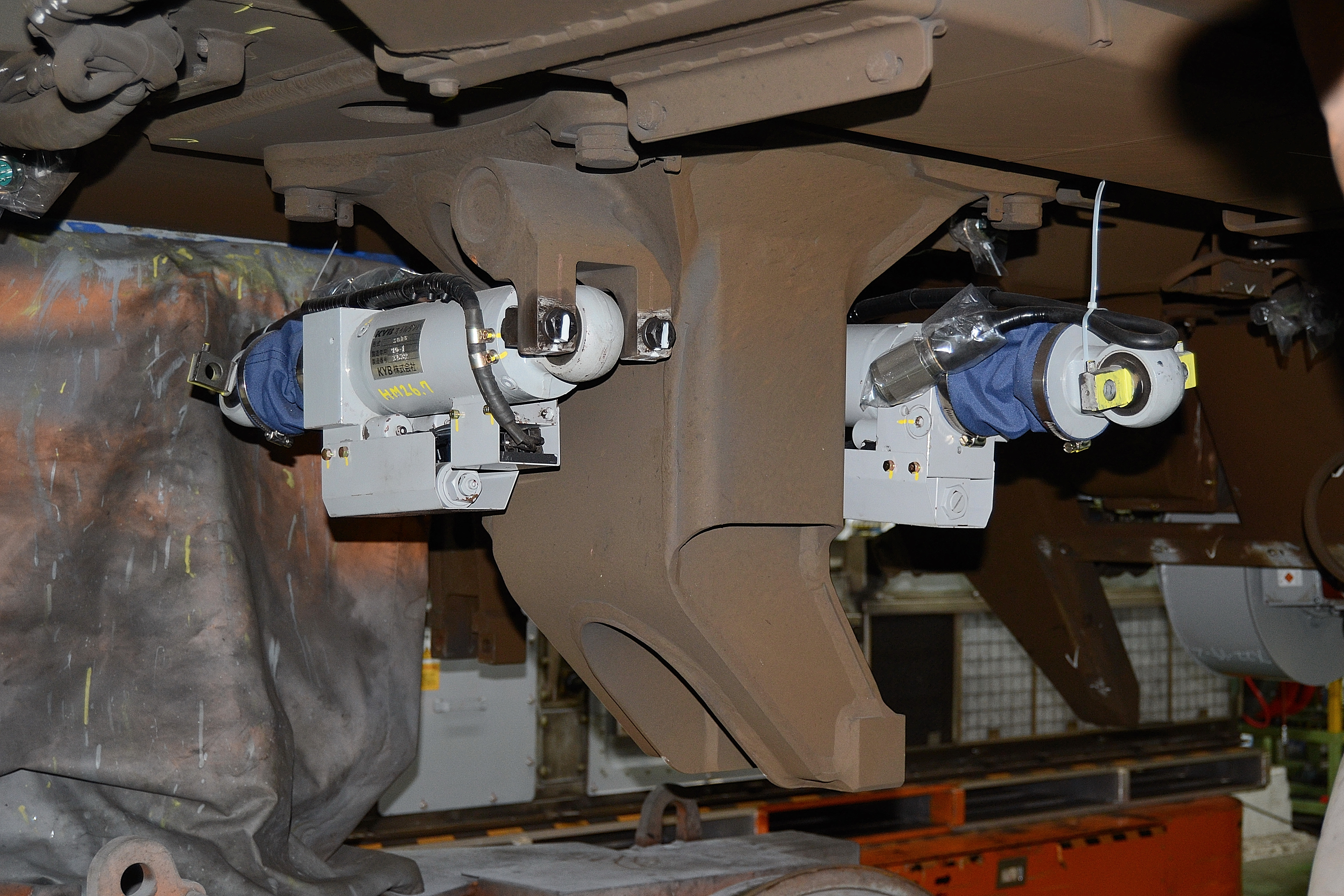 N700系の車体下部の牽引装置の中心ピン付近に装備されている、比例電磁弁リリーフ方式による無段階減衰力調整式のセミアクティブサスペイション（2014年、浜松工場で開催された新幹線なるほど発見デーにおいて撮影）。